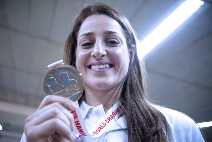 Eduarda Amorim é uma handebolista brasileira.